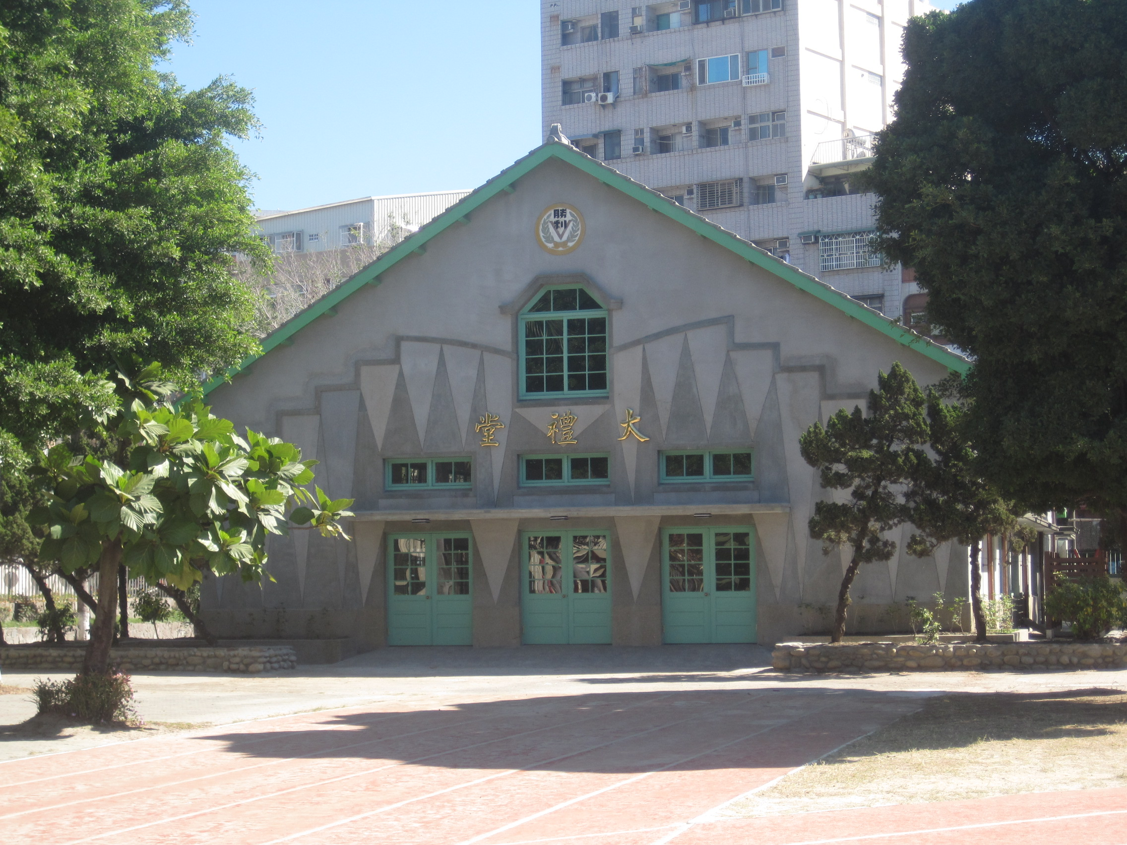 2014年拍攝的臺南勝利國小禮堂